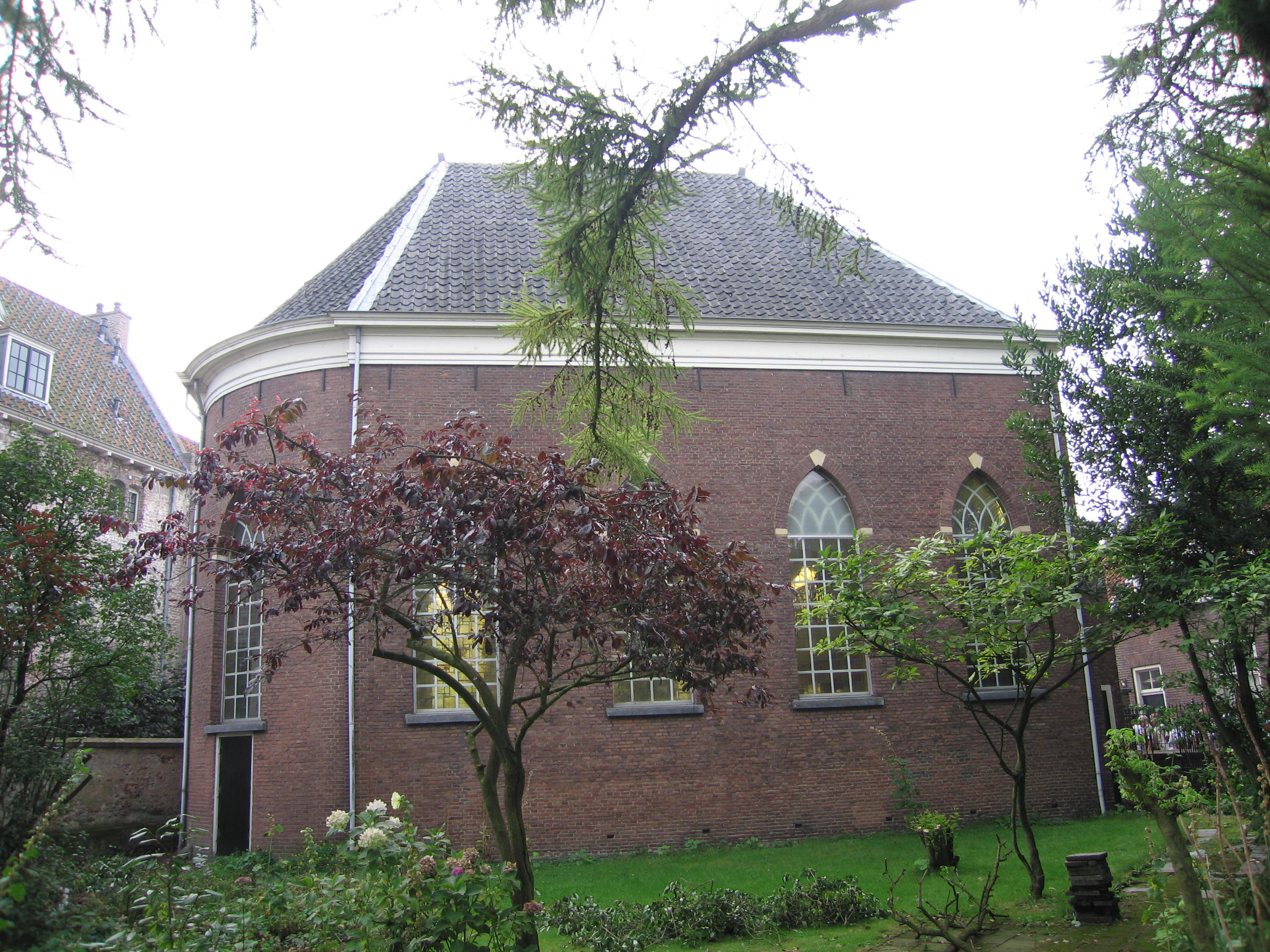 Synagoge der Ned.Israelitische Gemeente